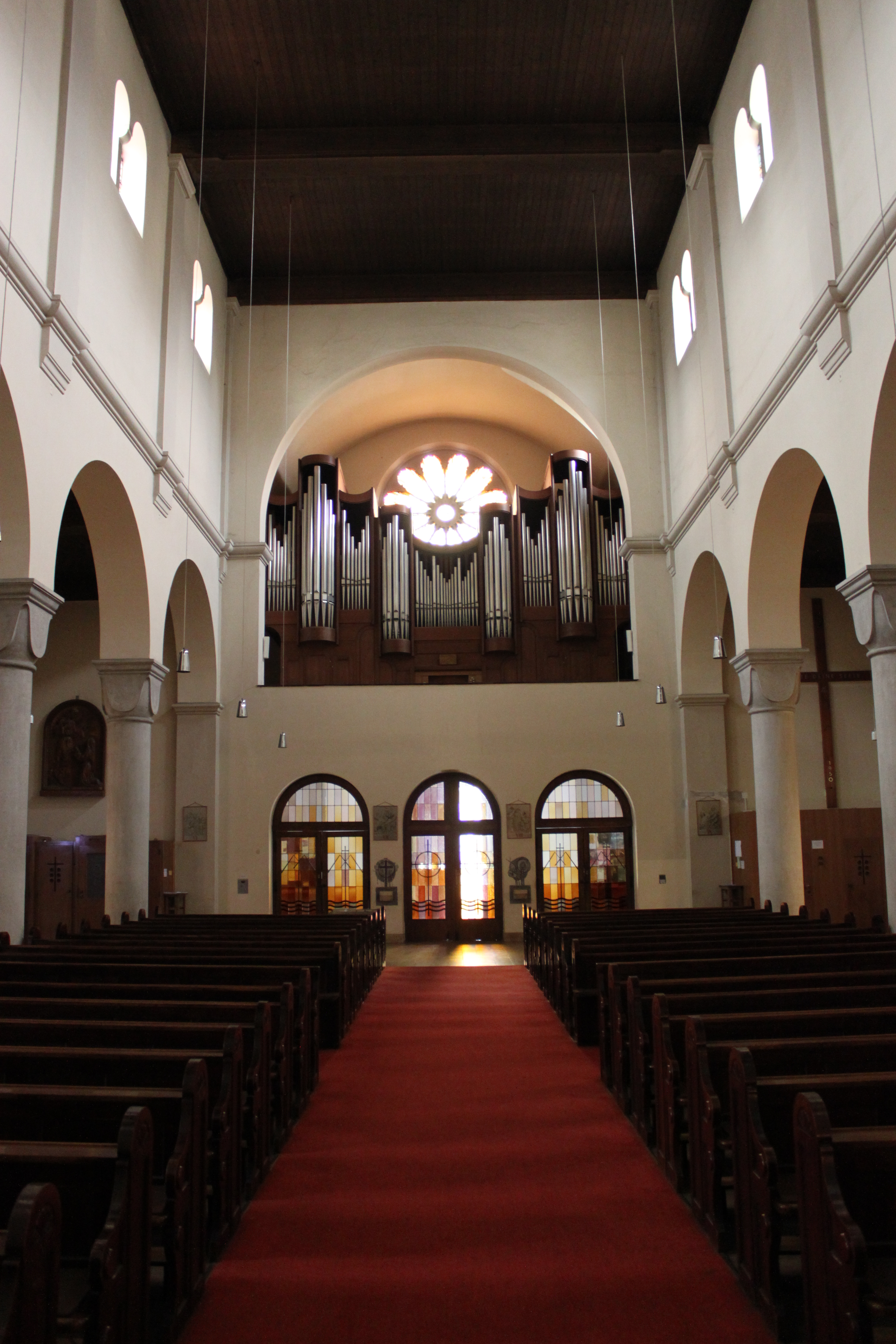 Kirchenschiff der Herz-Jesu-Sühnekirche in Wien 17, Blick Richtung der 1991 errichteten Eisenbarth-Orgel